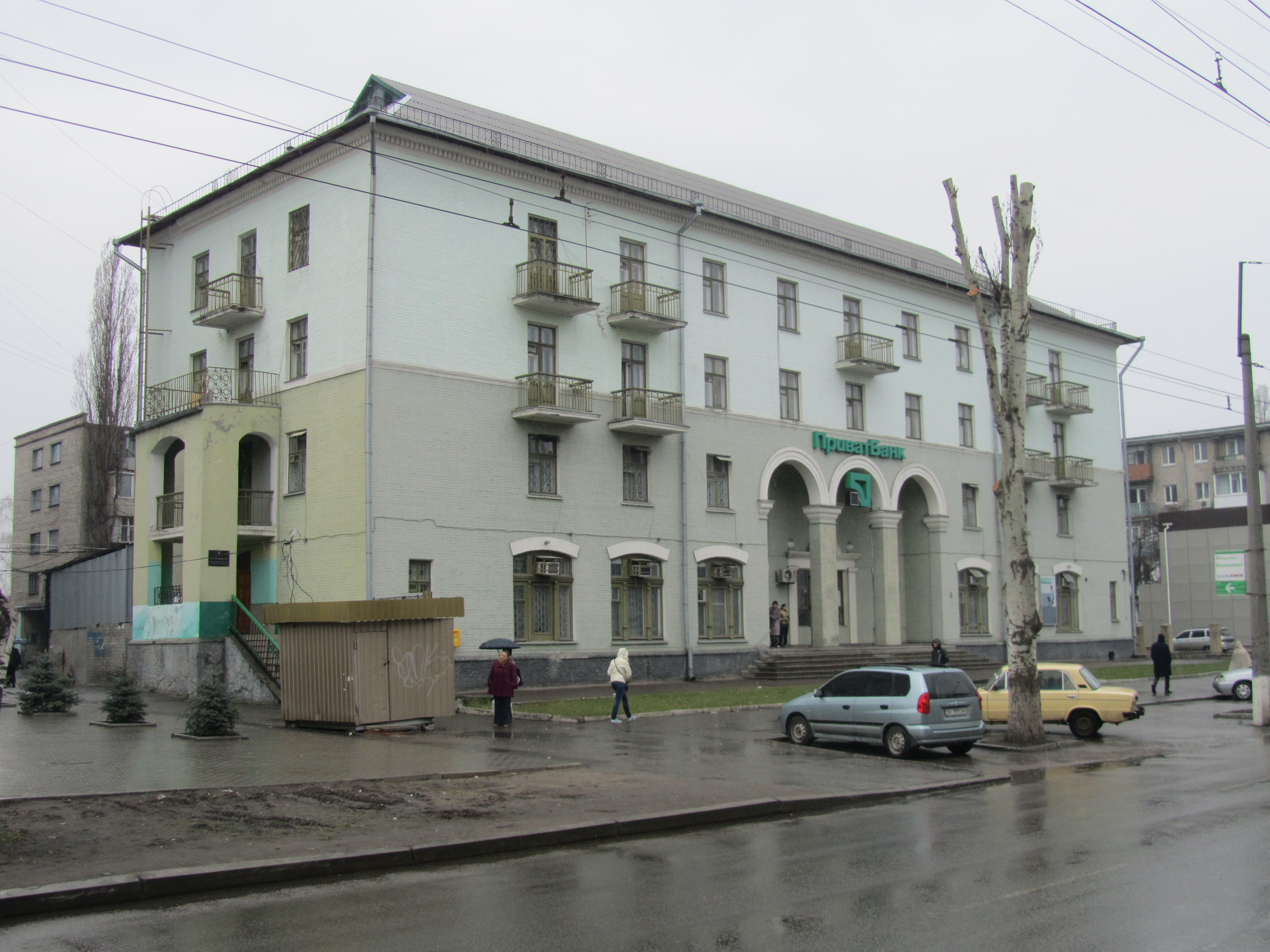 Гуртожиток технікуму залізничного транспорту (Філія АКБ "Приватбанк"), Кременчук, Вул. Першотравнева